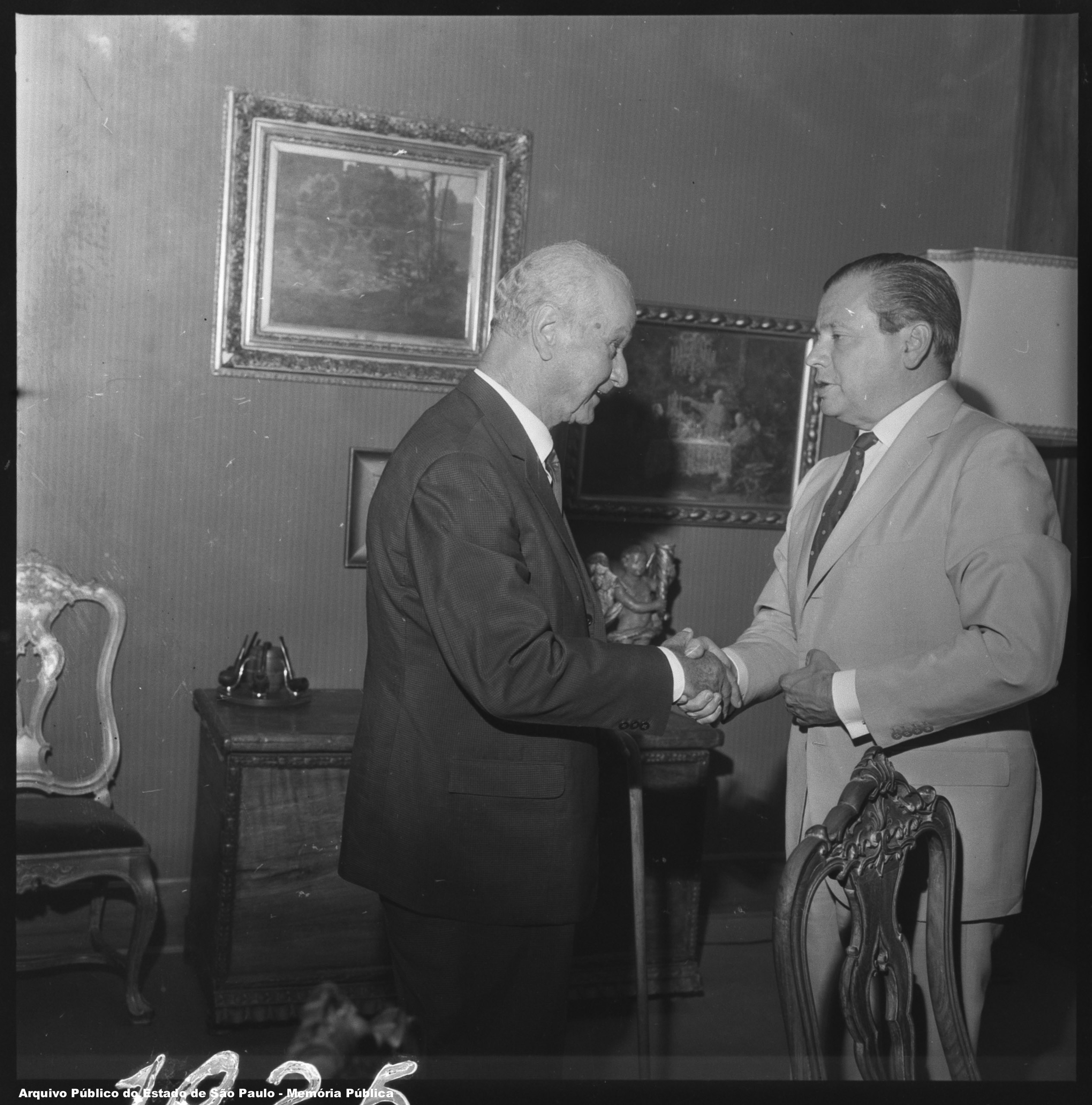 O Doutor Benedito Montenegro em visita ao governador de São Paulo Abreu Sodré. Imagem do Acervo iconográfico do Arquivo Público do Estado de São Paulo, código BR APESP SEGOV ICO NEG 2019 01.